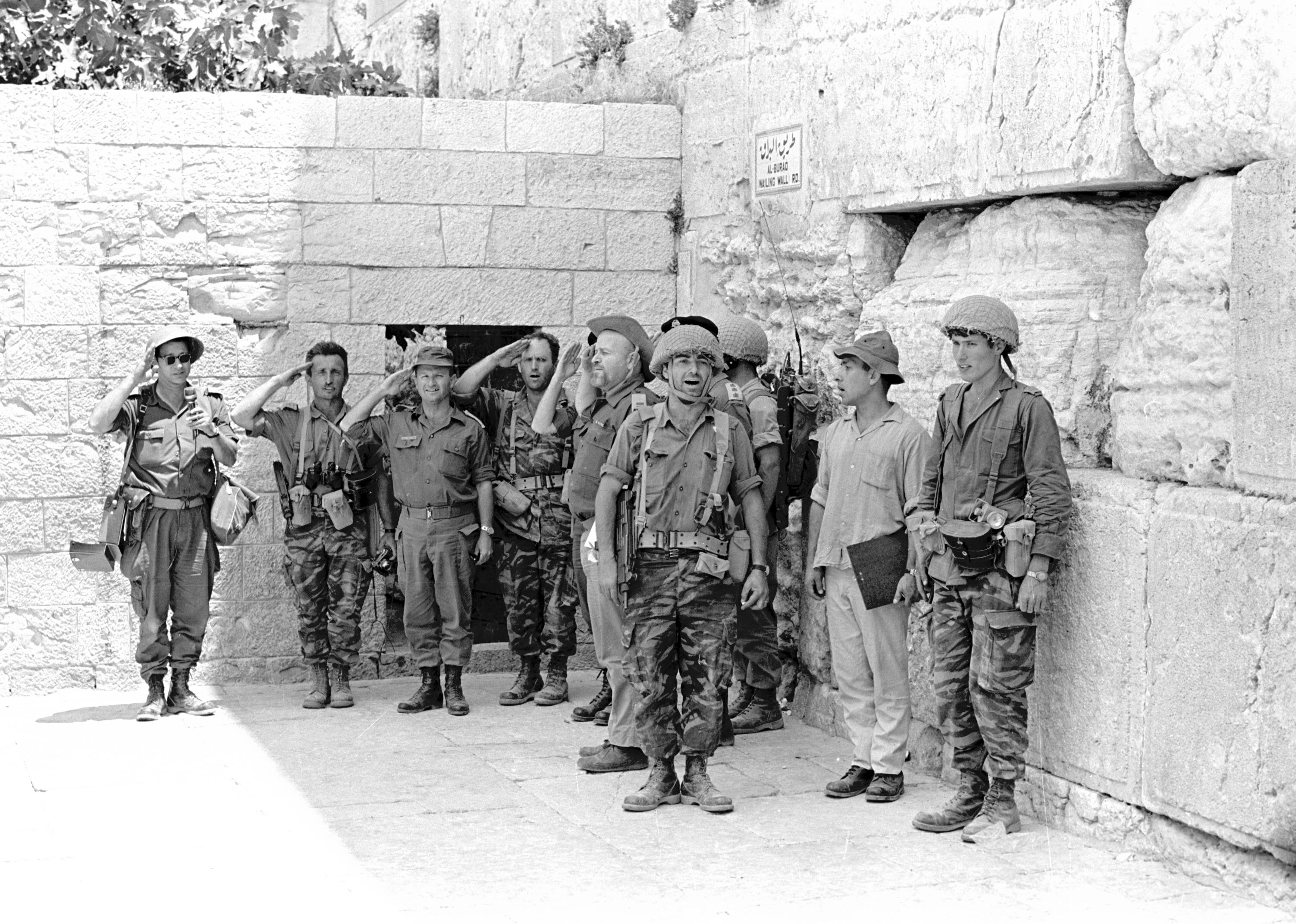 מלחמת-ששת-הימים, ירושלים. הצנחנים שרים את ההמנון ליד הכותל המערבי בהר-הבית מפקד פיקוד המרכז אלוף עזי נרקיס בכובע מצחיה, שלישי משמאל בשירת התקווה ליד הכותל המערבי. סגן דידי מנוסי. ראשון משמאל כתב קול ישראל רפי אמיר.